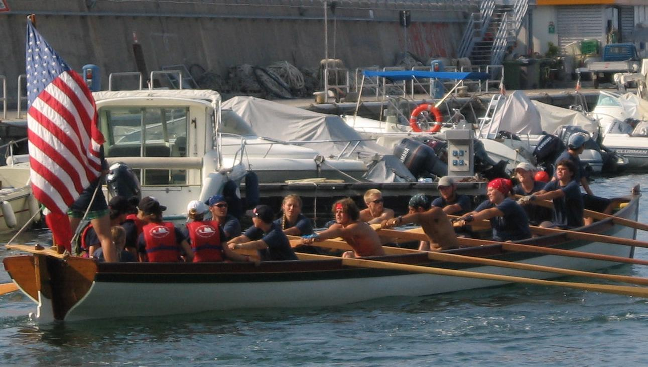 La yole américaine "Vérité" lors de la compétition Atlantic Challenge 2006 qui avait lieu à Gênes en Italie.